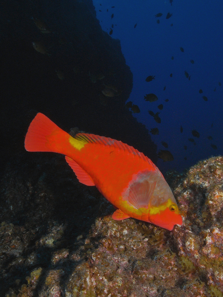 female Sparisoma cretense - Parrotfish / Vieja (pez loro) / Poisson perroquet, el Hierro.